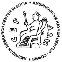 Лого на АНЦС